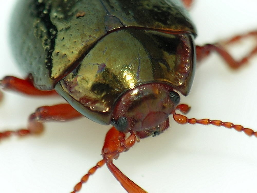 Chrysolina bankii. Escaravello en Bastavales, Brión